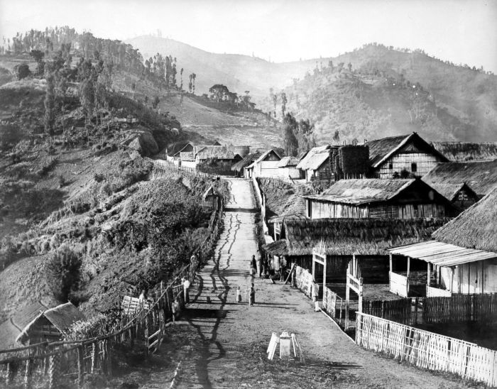 Negatief. Weg door het dorp Tosari, Oost Java